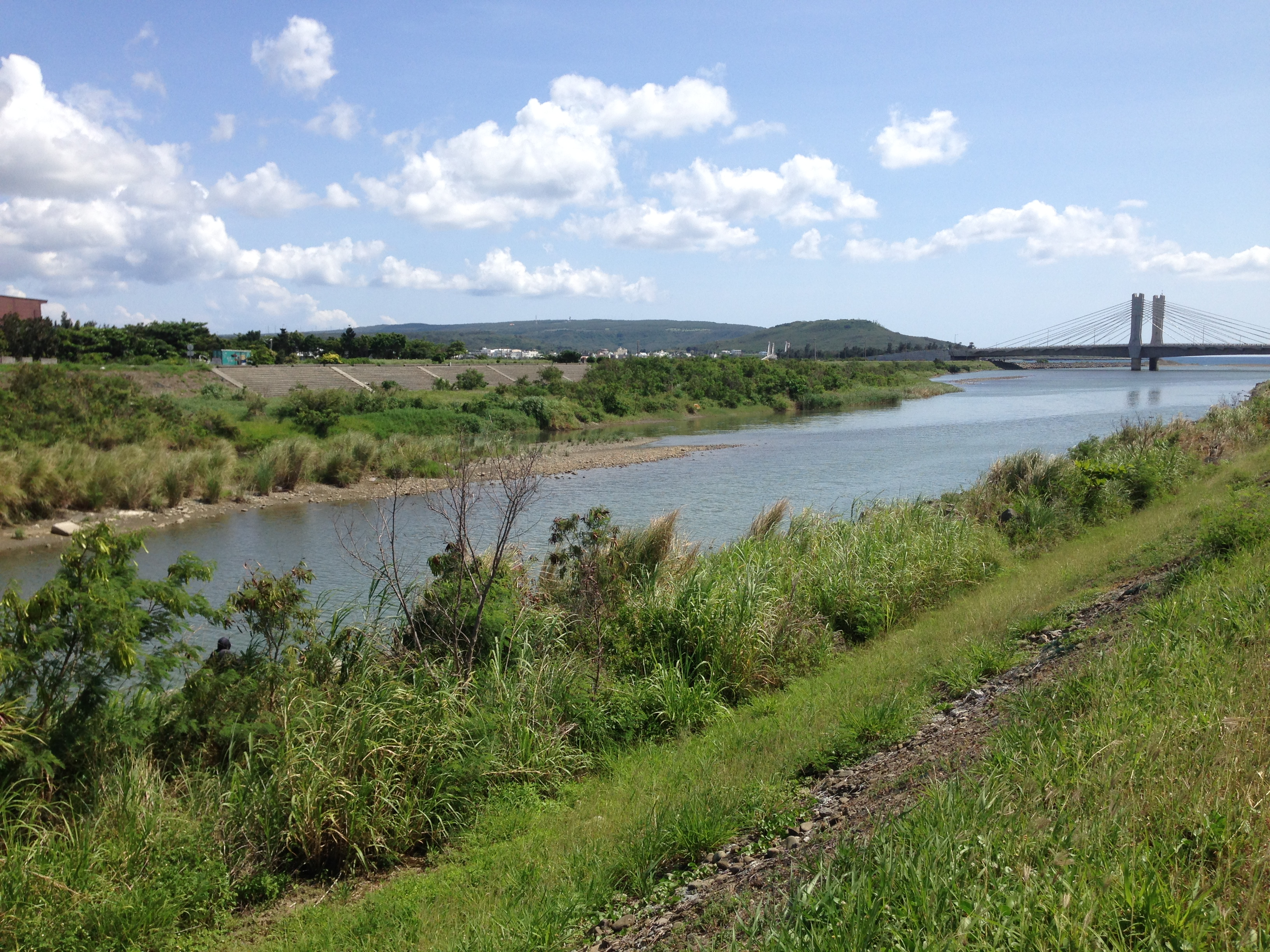 中文（台灣）: 四重溪與車城橋